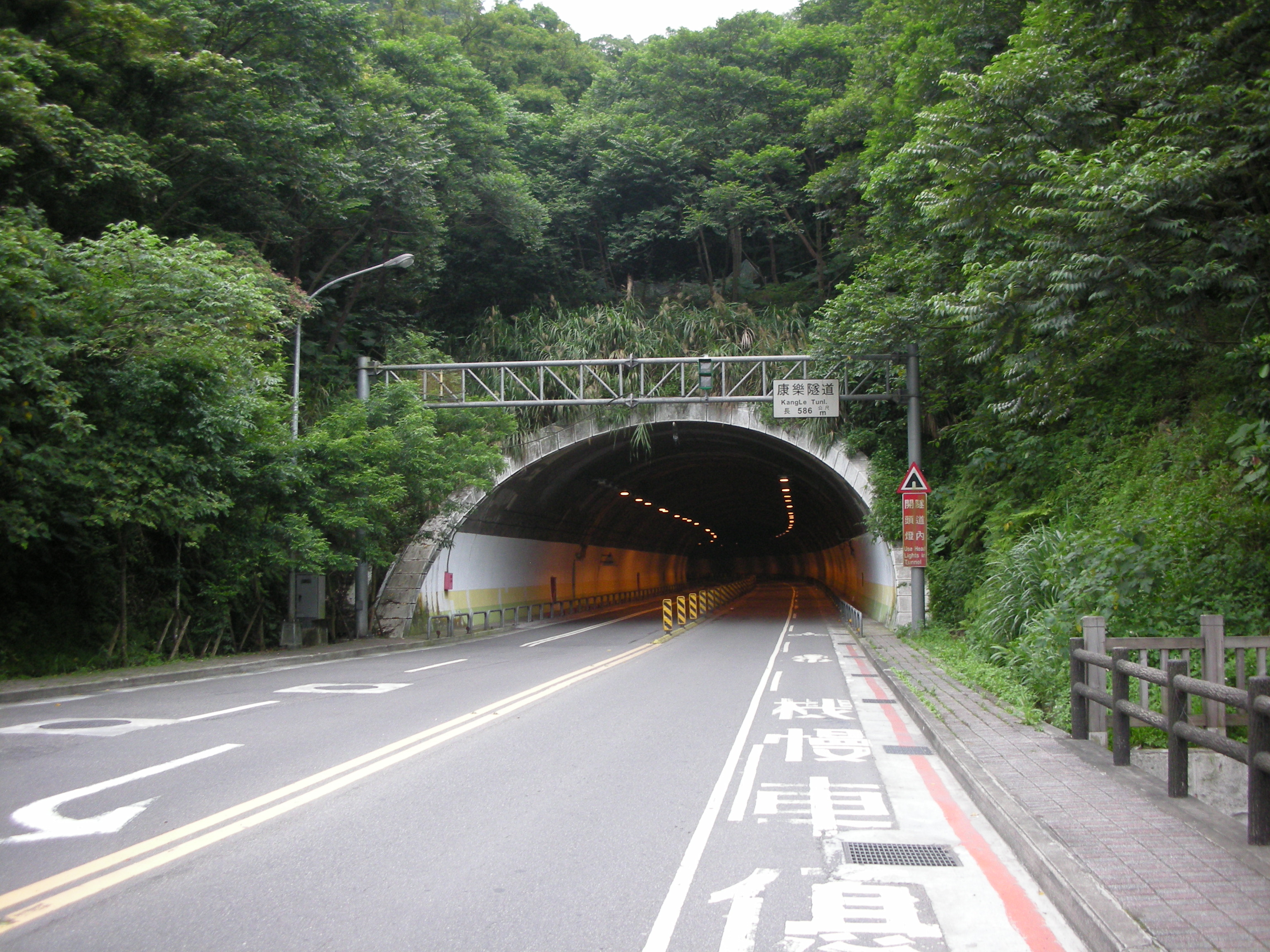 康樂隧道東南端入口